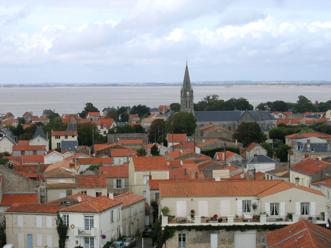 Fouras, France